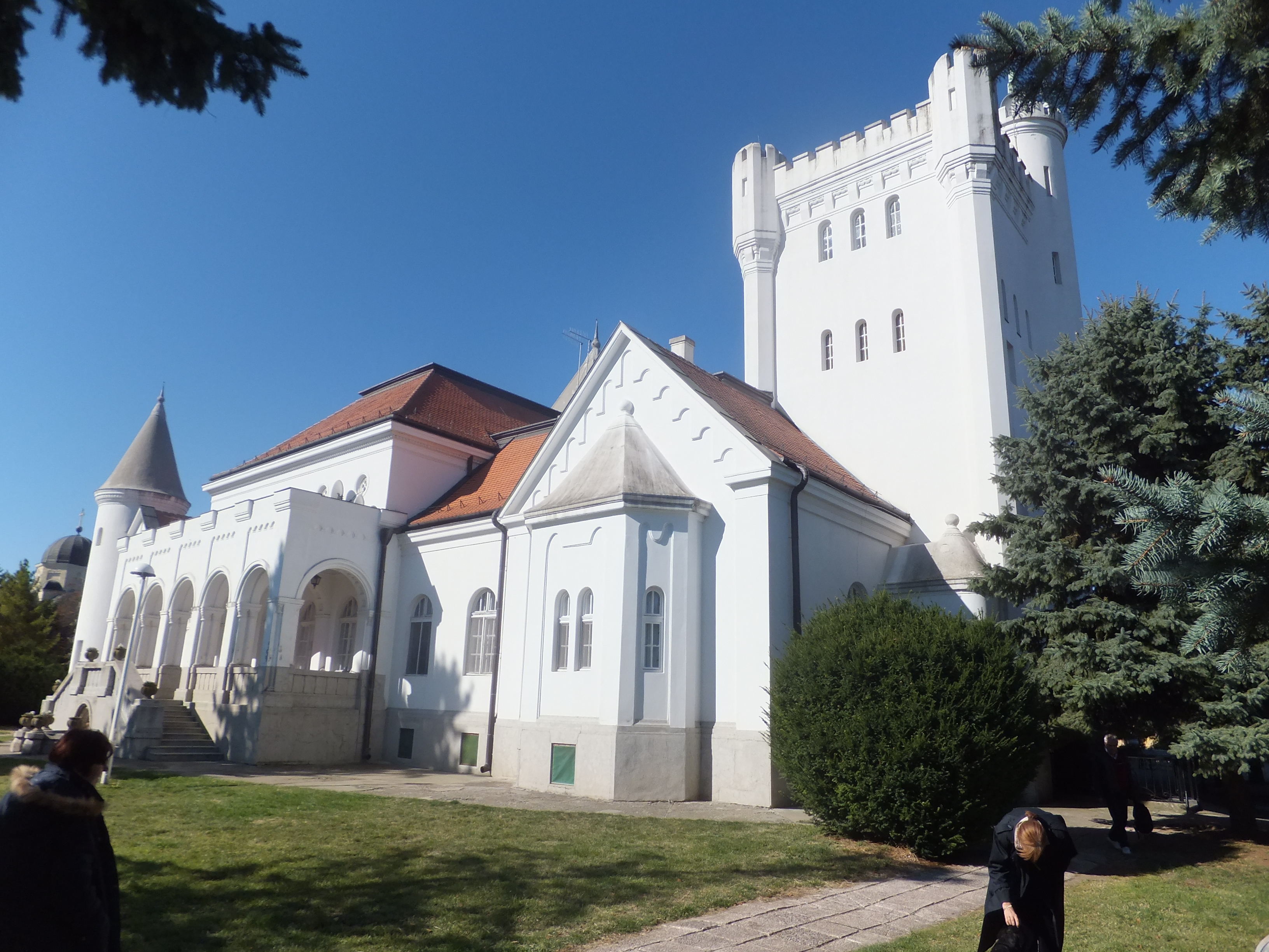 Дворац Фантаст у атару Бечеја